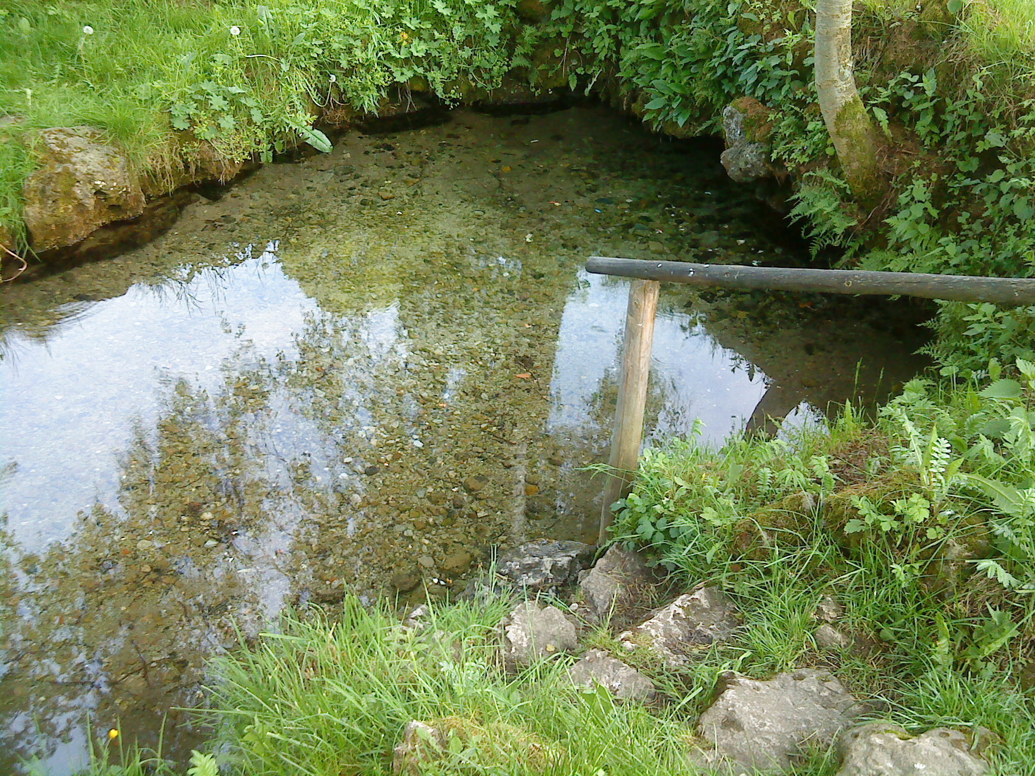 Karstquelle der Wiesent, Steinfeld, Fränkische Schweiz, Bayern